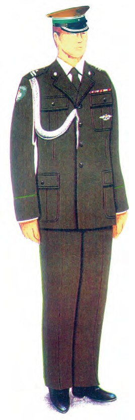 Ubiór galowy funkcjonariuszy noszących umundurowanie Wojsk Lądowych z mundurem wyjściowym noszonym ze sznurem galowym oraz z czapką garnizonową.